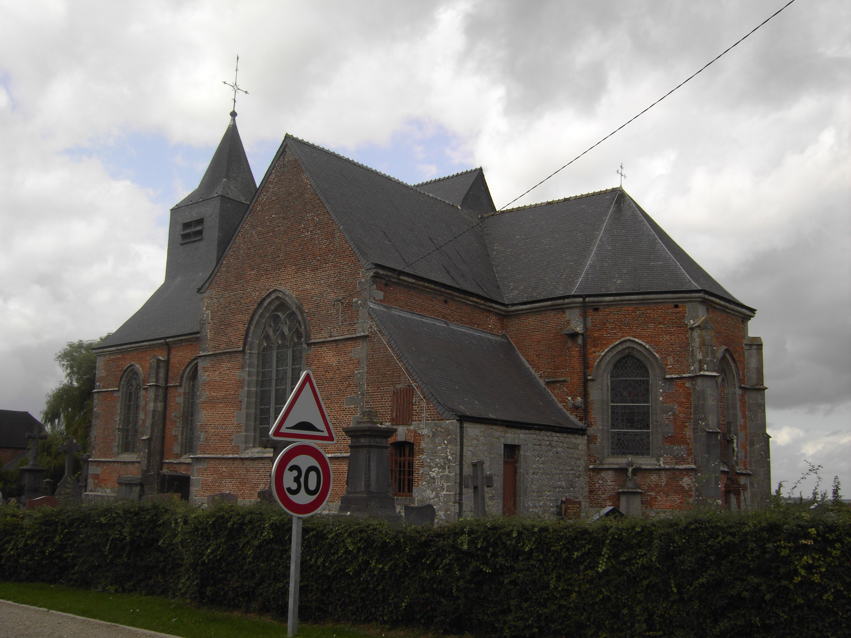 Clairfayts - Nord the France - France